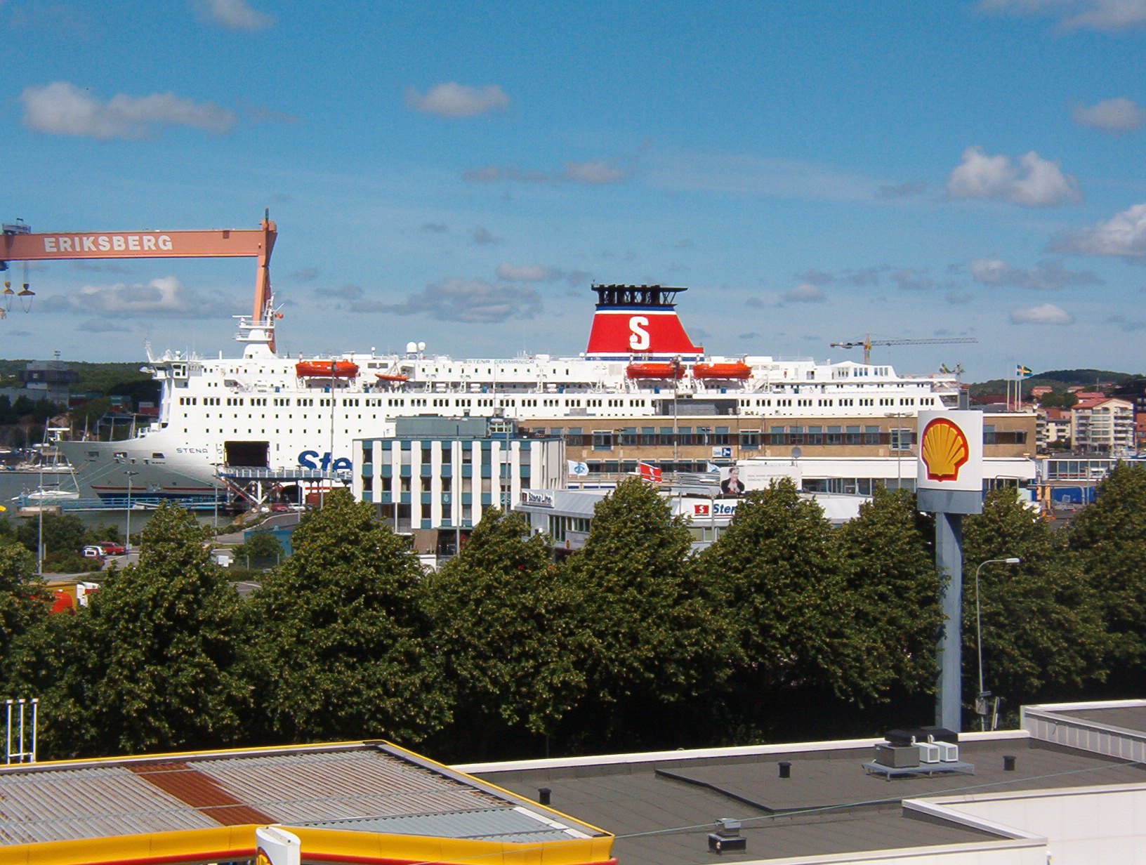 Stena Germanica at Majnabbe, Göteborg, Sverige (Sweden).jpg Date: JUL, 2005